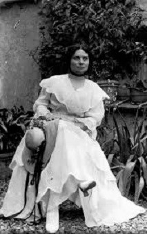 Enif Robert Angiolini (1886 - 1974)